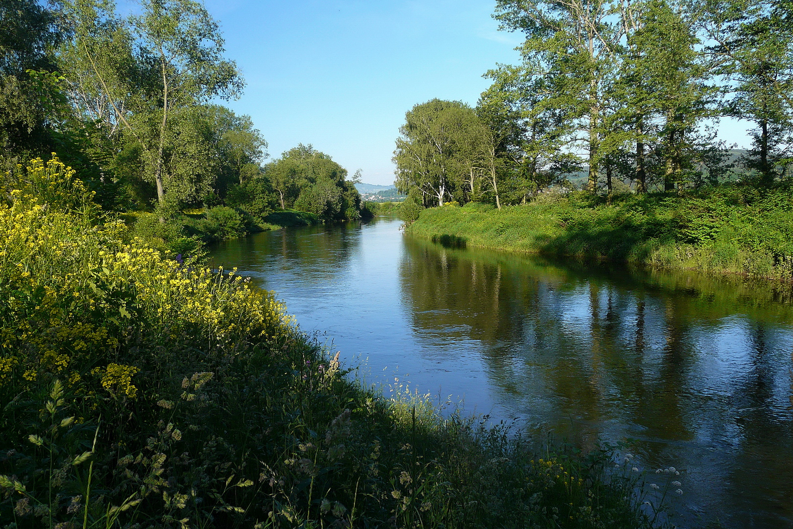 Jizera u Velkého Písečáku